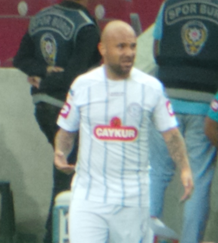 Hurşut Meriç Rizespor